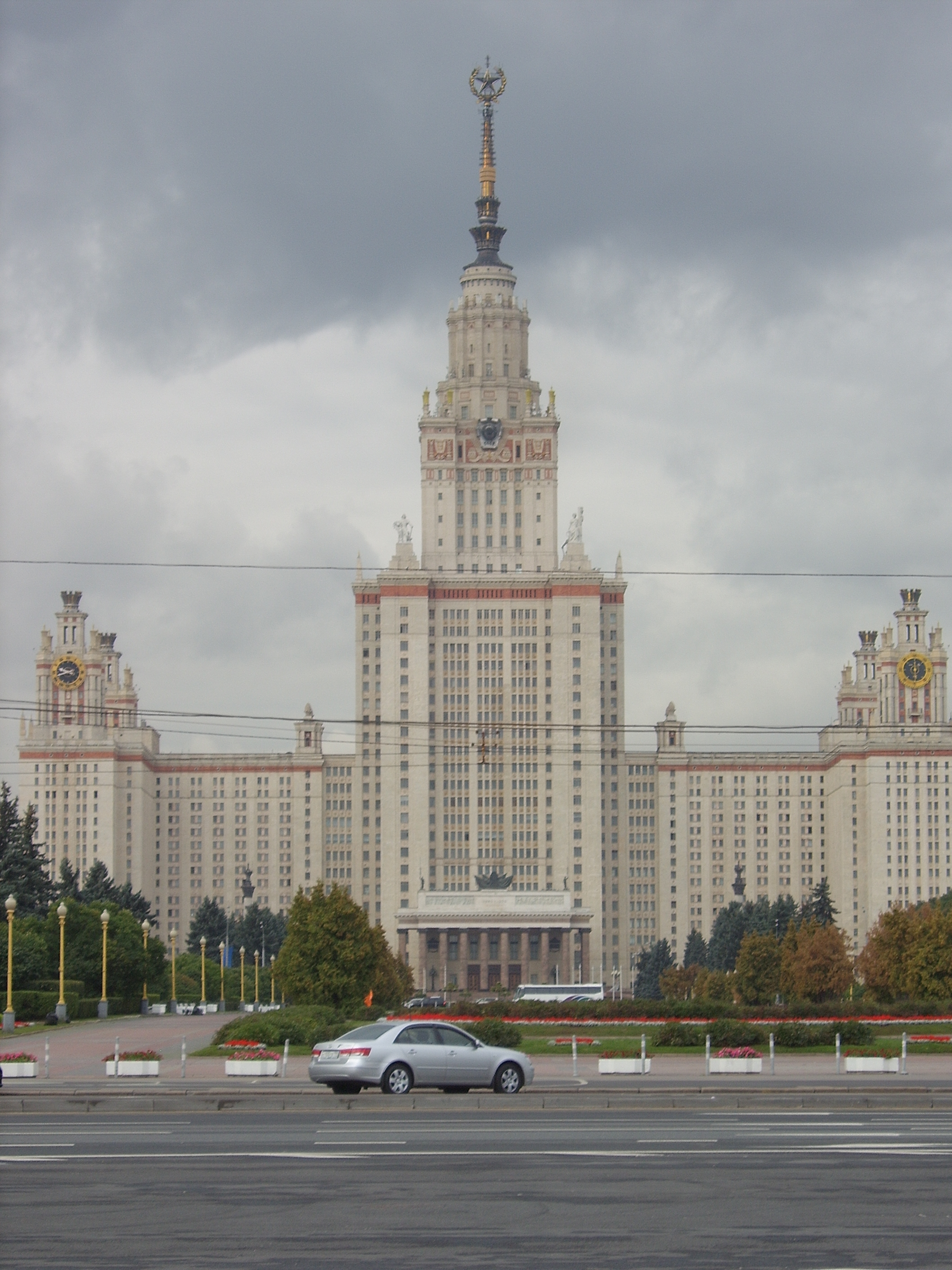 touristenfotos von Moskau